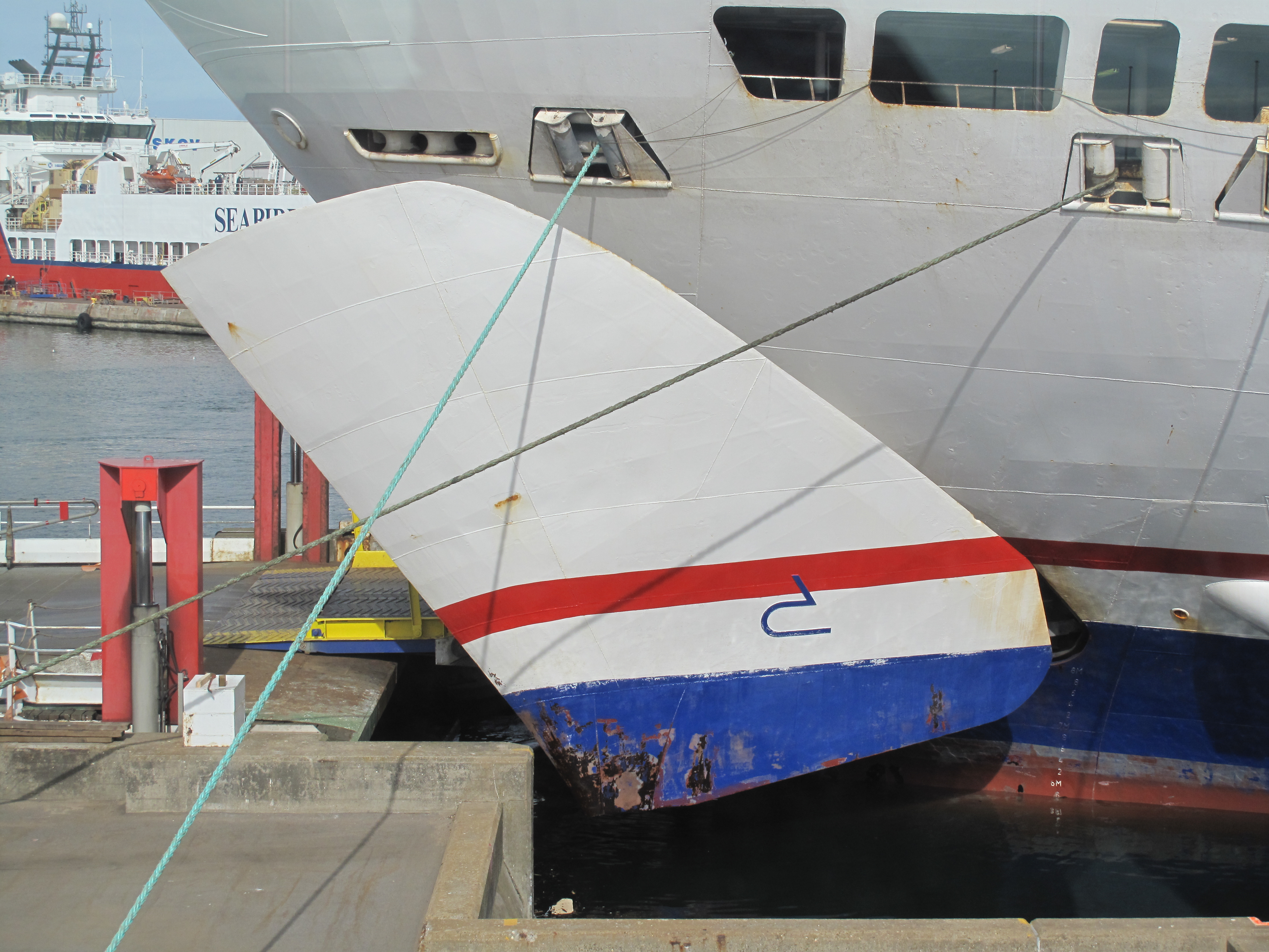 Bogvisir på M/S Stena Danica. Information about Stena Danica may be found at IMO 7907245. A ship can change her name and flag state through time, but the IMO number remains the same through the hull's entire lifetime. Therefore, it's useful to identify a ship through her IMO number.